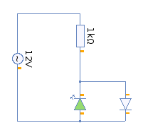 ejemplo de un diodo led conectado en alterna con un diodo en antiparalelo